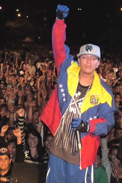 Foto en Guacara Fest 4000 personas